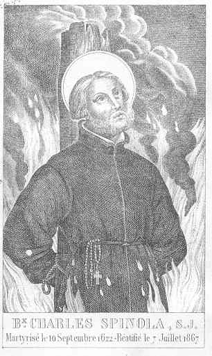 Gravure ancienne de Charles Spinola, jésuite italien, martyr à Nagasaki au Japon (1622)